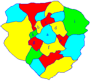 Creado por Romero Schmidtke, para la Enciclopedia Libre